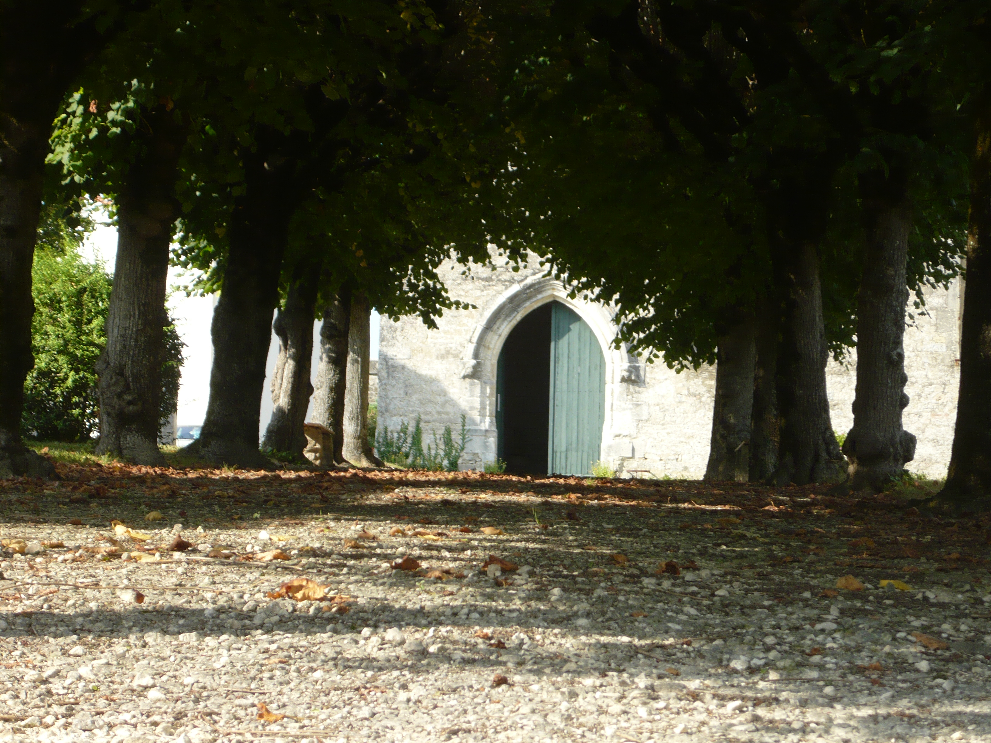 Allée ombragée de la Place de l'église Saint-Benoît de Migré (17)